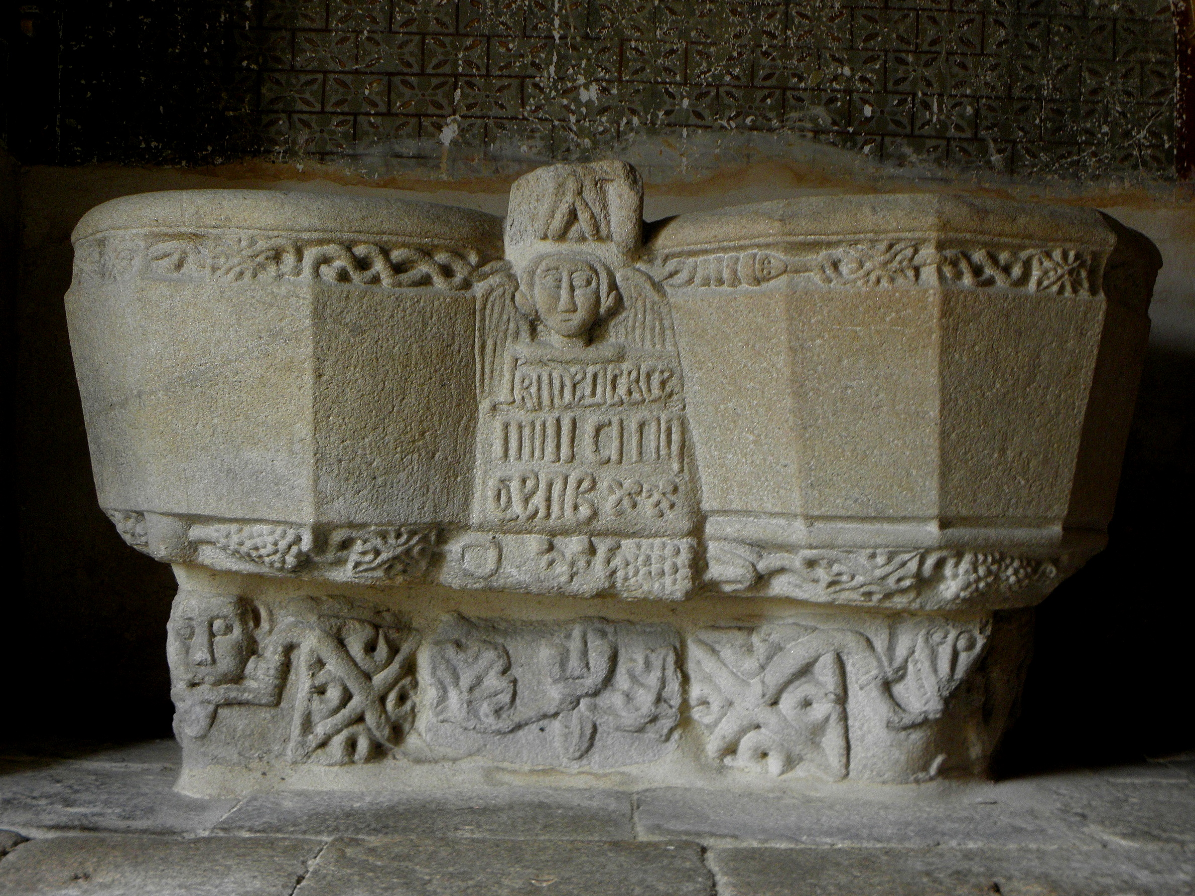 Fonts baptismaux de l'église Saint-Pierre de Quédillac (35).